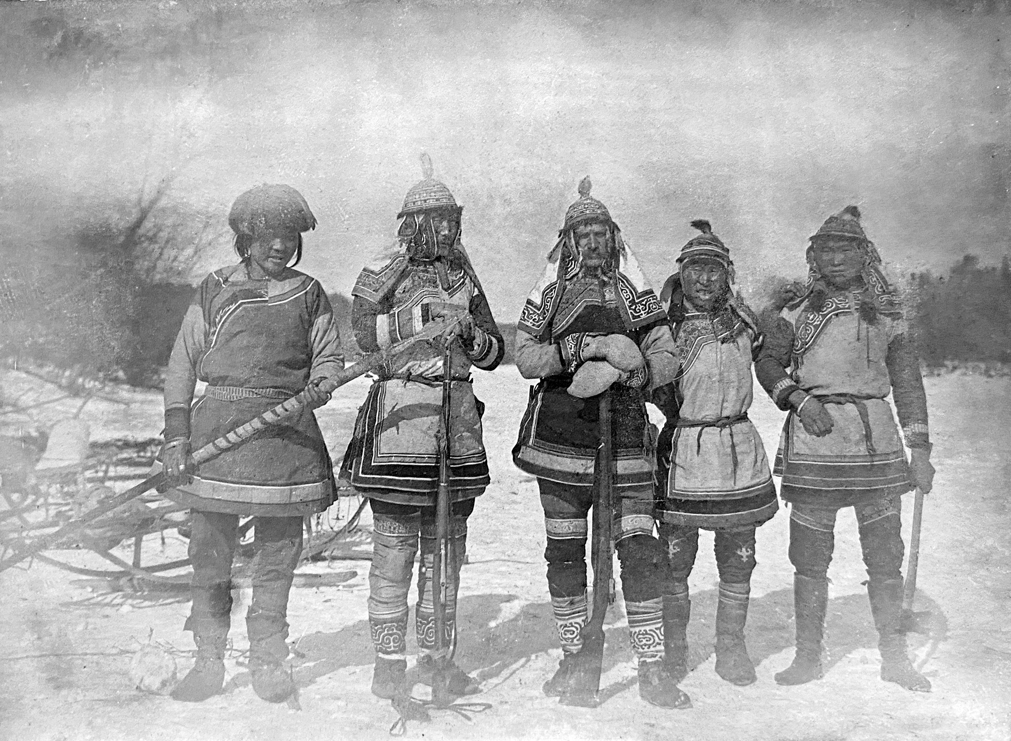 Владимир Клавдиевич Арсеньев и удэгейцы с реки Анюй. Фотография сделана во время одной из экспедиций В. К. Арсеньева, вероятно, в 1908-1910 годах. Рисунок «Удэхейцы с р. Анюя. В середине группы—автор.», срисованный с этой фотографии, был помещён в книге В. К. Арсеньева «Лесные люди — удэхейцы», изданной в 1926 году. В книге «Владимир Клавдиевич Арсеньев. Собрание сочинений в 6 томах» фотография подписана «В. К. Арсеньев в удэгейском костюме (в центре) среди проводников на реке Анюй».